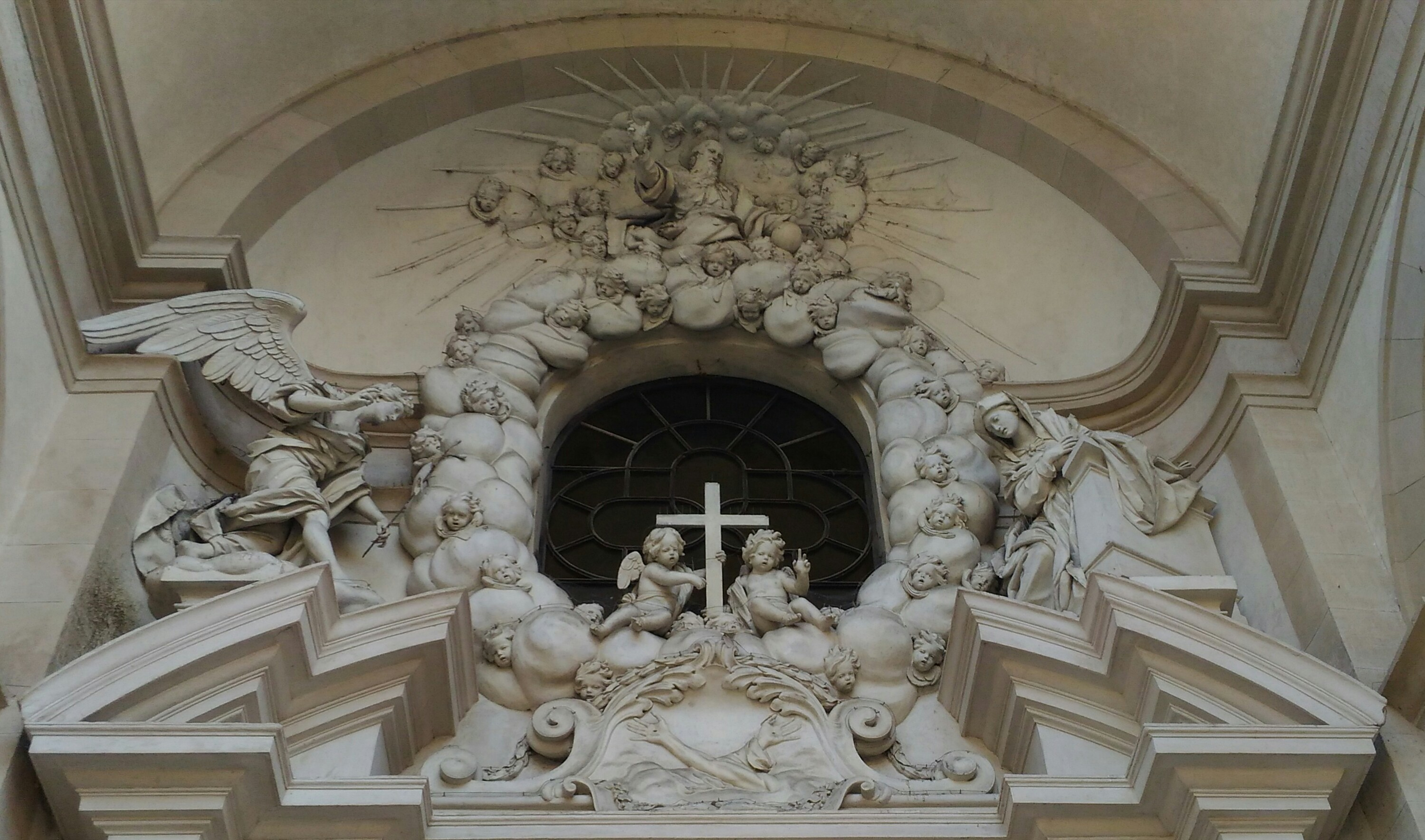 chiesa annunziata